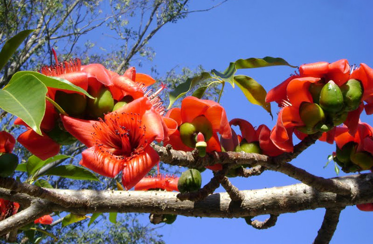 Paineira vermelha da Índia Nome científico: Bombax ceiba